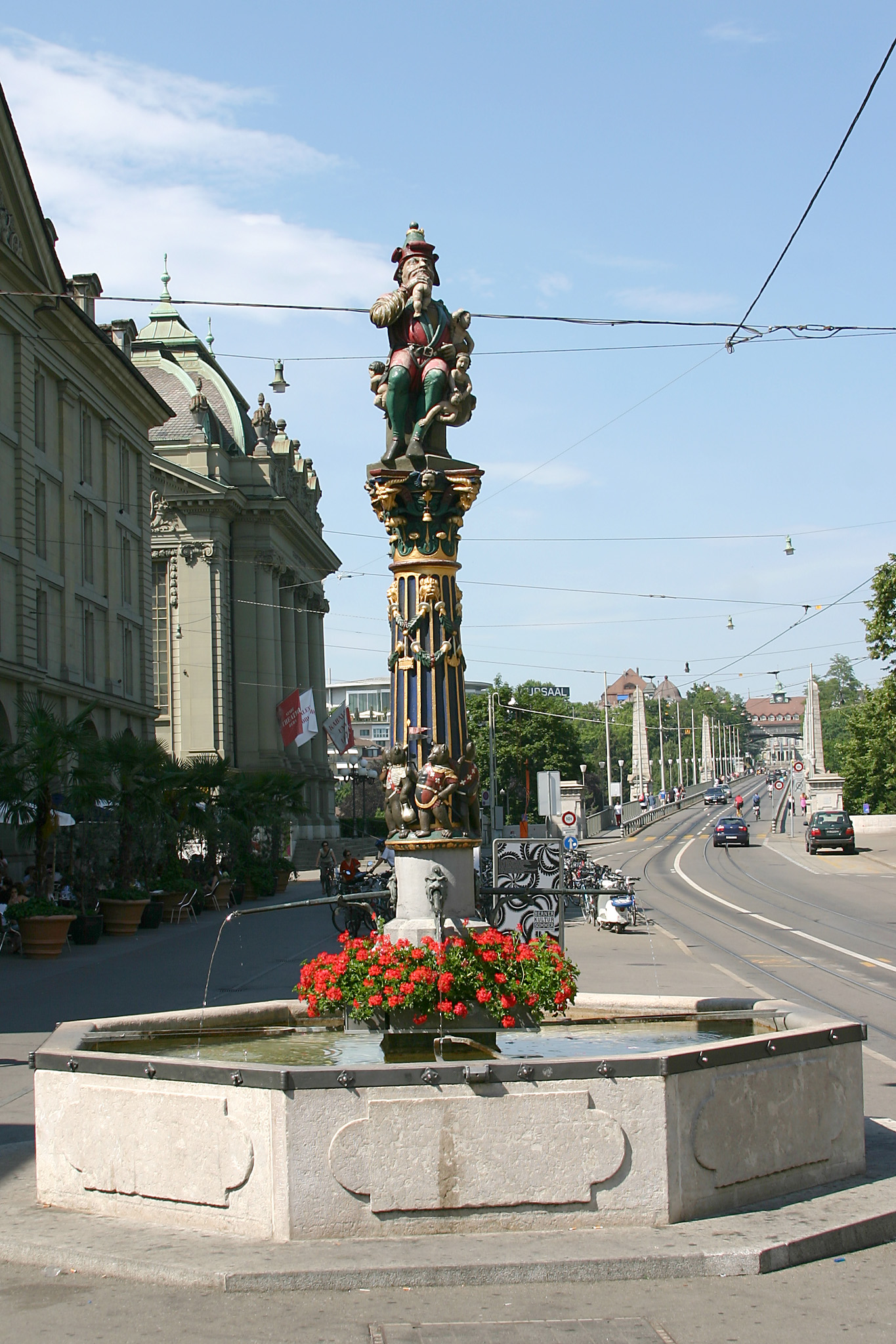 Kindlifresserbrunnen, Bern, Switzerland